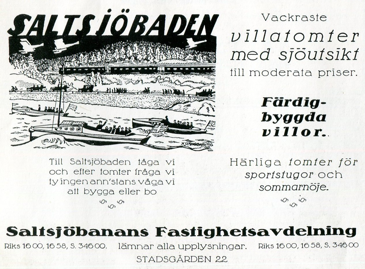 Saltsjöbanans Fastighetsavdelning annons för villatonter